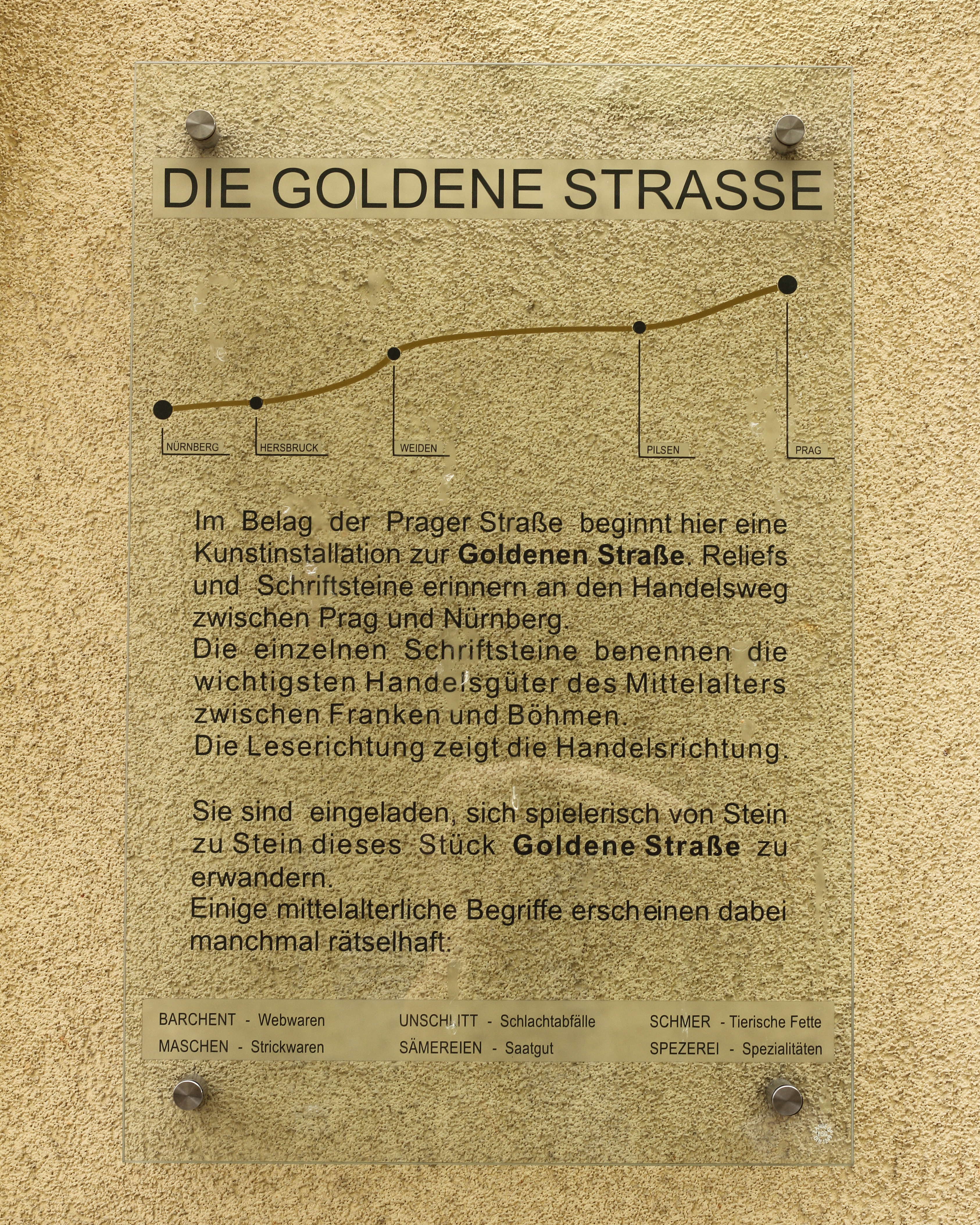 Hersbruck - Die Goldene Straße - Informationstafel am Anfang der Prager Straße